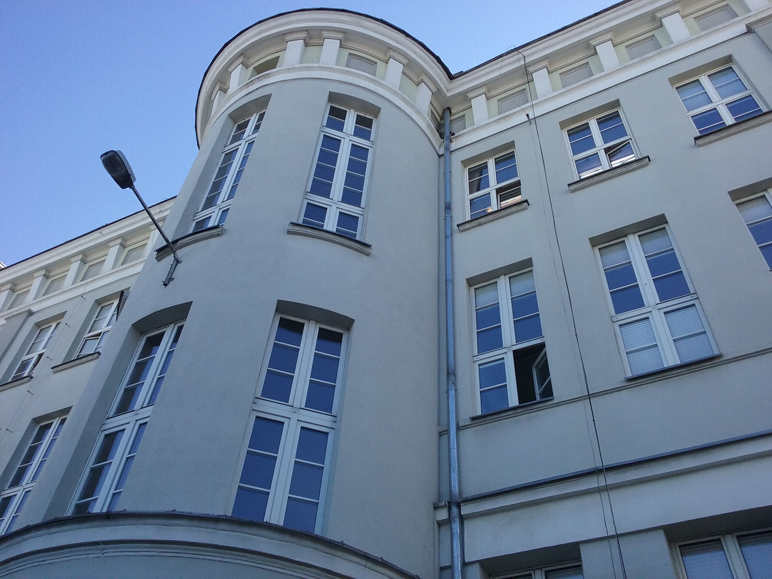 Tomaszów Mazowiecki, Urząd Miasta (widok z dziedzińca)